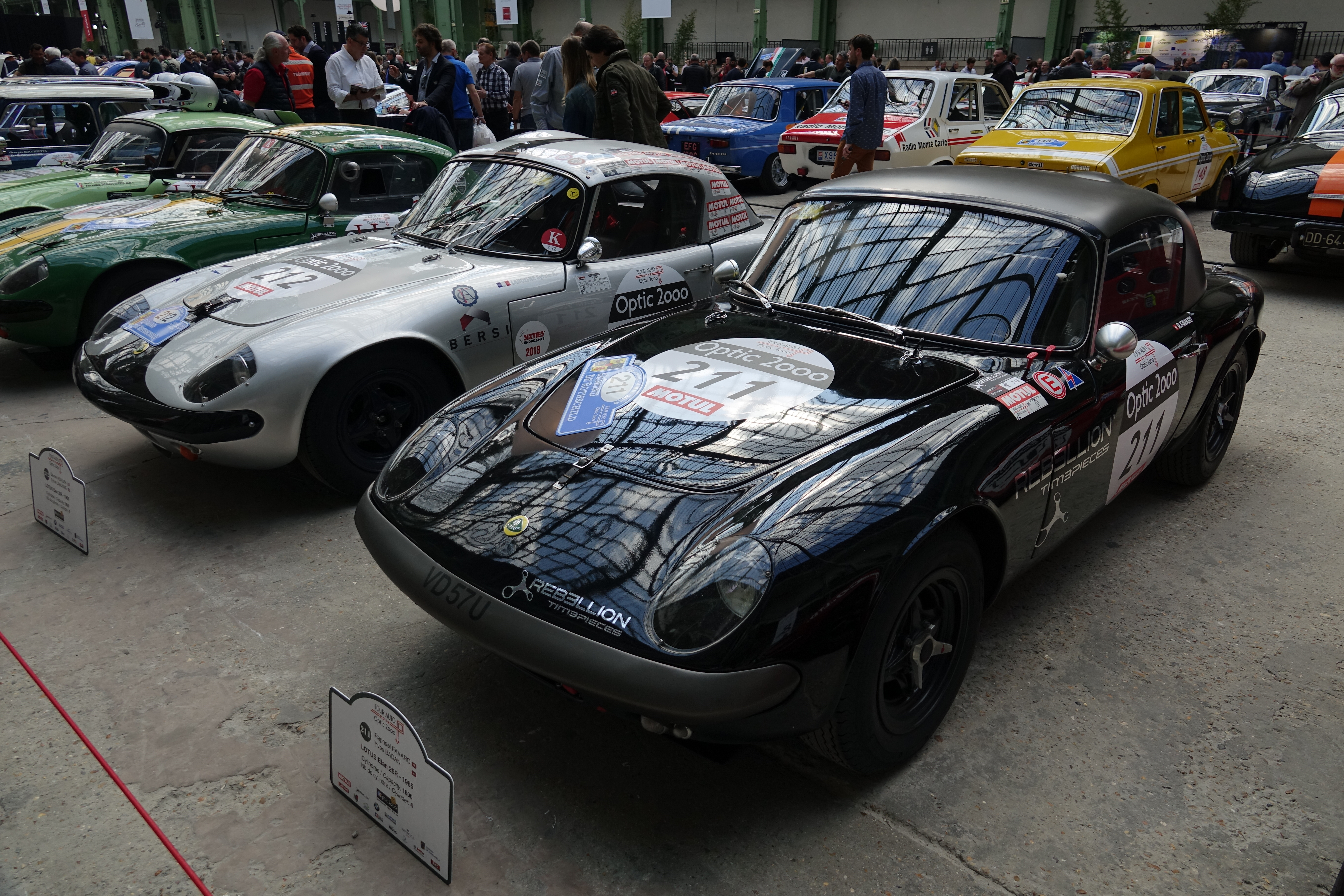 Lotus Elan 26R vainqueur du Tour Auto 2019